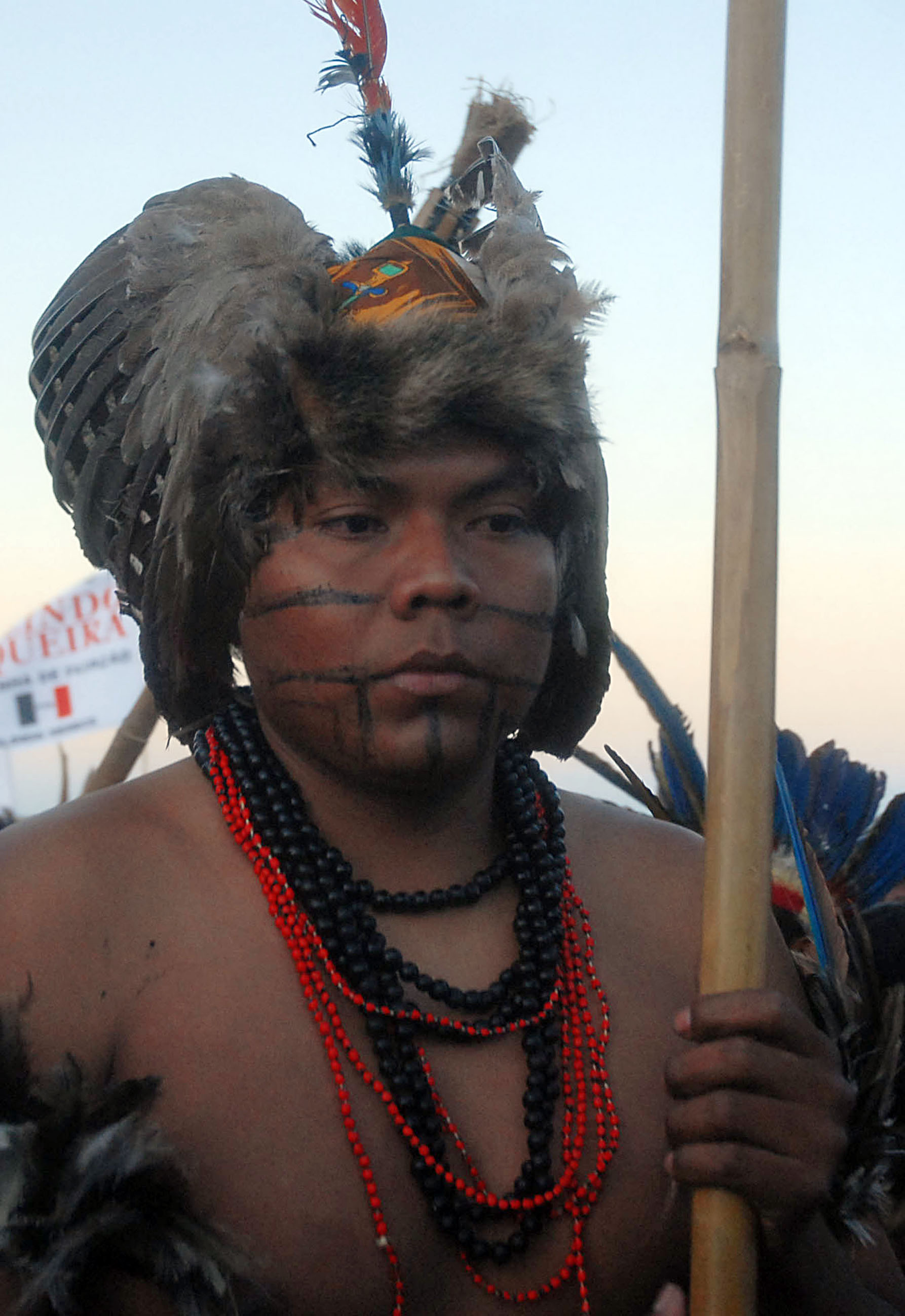 Índio da etnia Terena na cerimônia de encerramento da nona edição dos Jogos dos Povos Indígenas (Olinda PE)